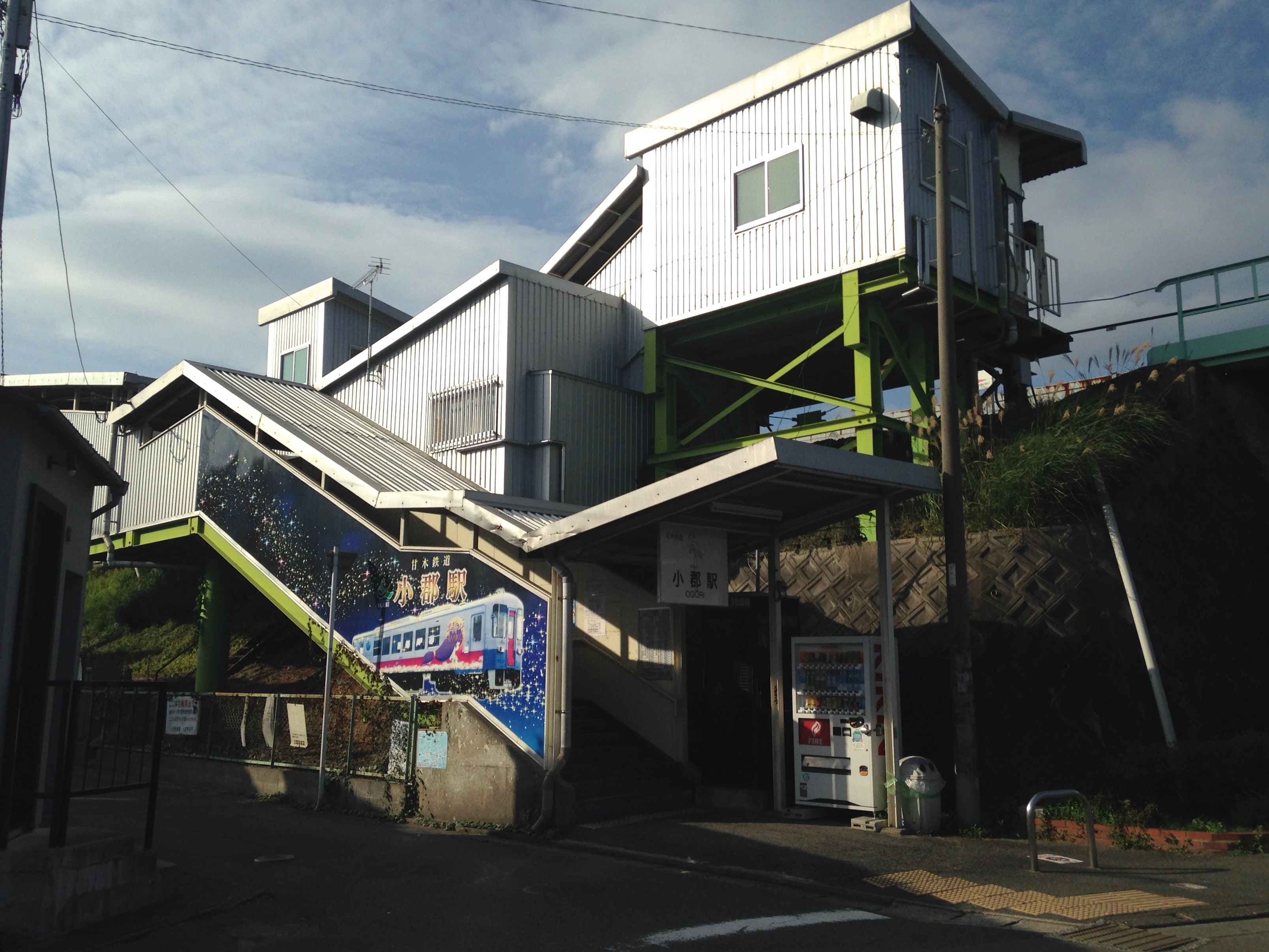 小郡駅駅舎